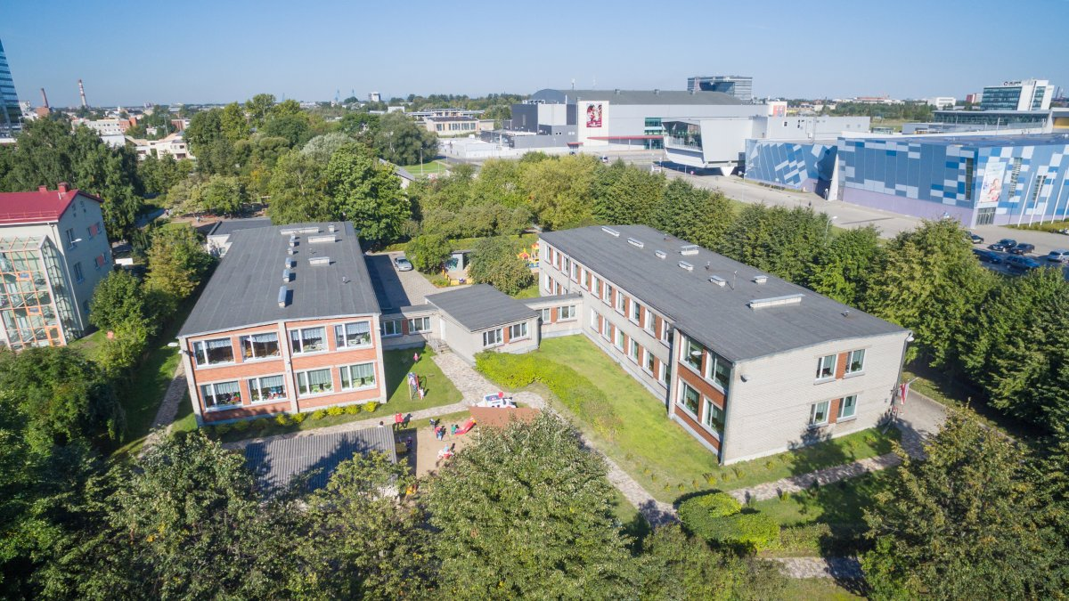 Rīgas 66 PII